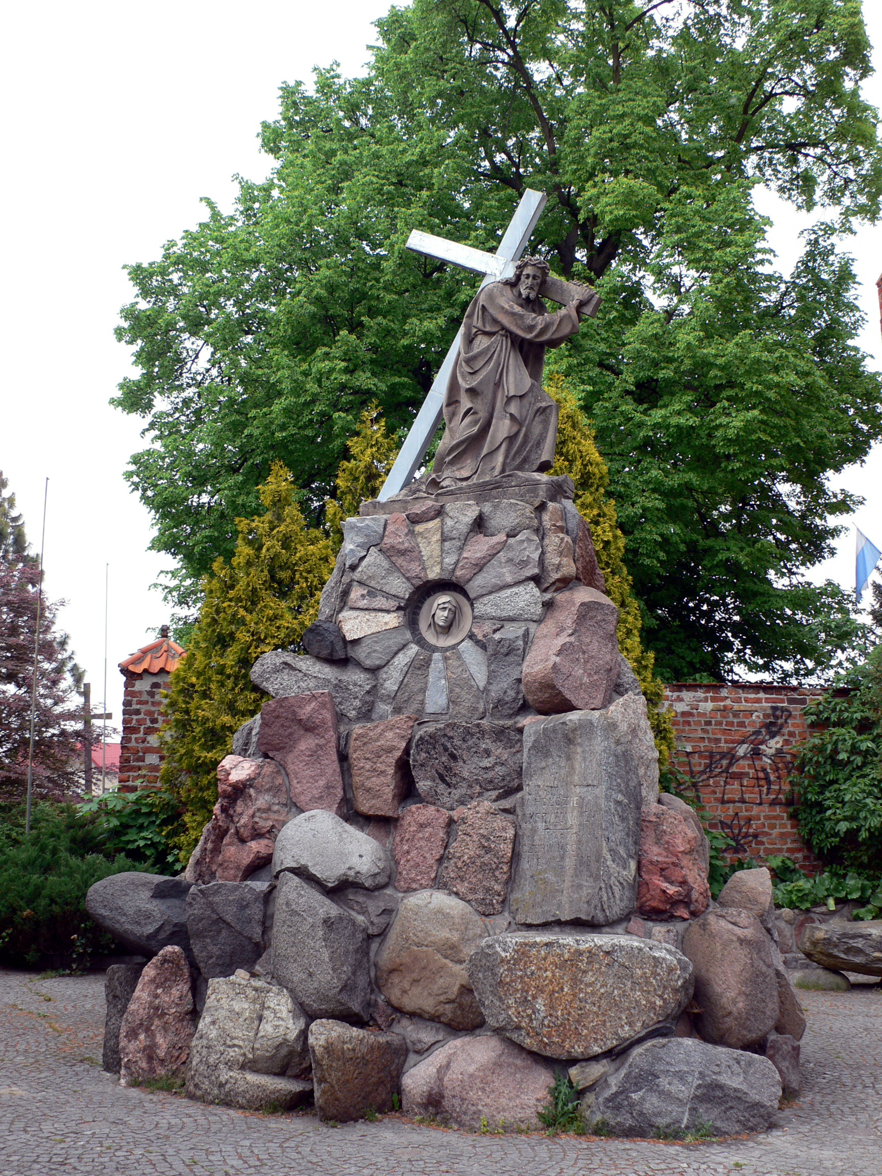 Kościół Zwiastowania Najświętszej Maryi Panny w Czerwińsku nad Wisłą - figura Pana Jezusa niedaleko kościoła.